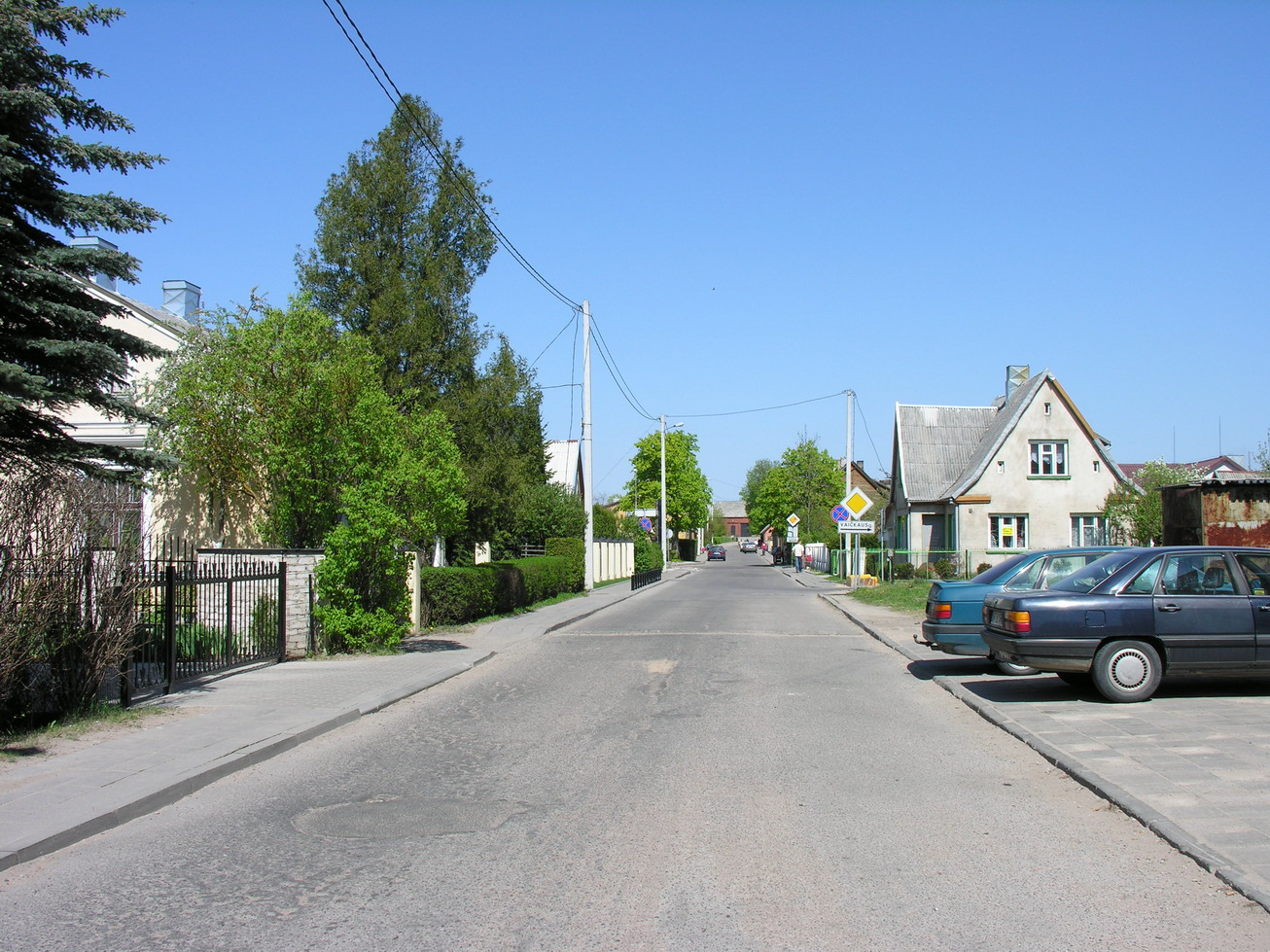 Mažeikiai, Bažnyčios gatvė, 2006 m. Foto: Algirdas, 2006 m. gegužės 11 d.